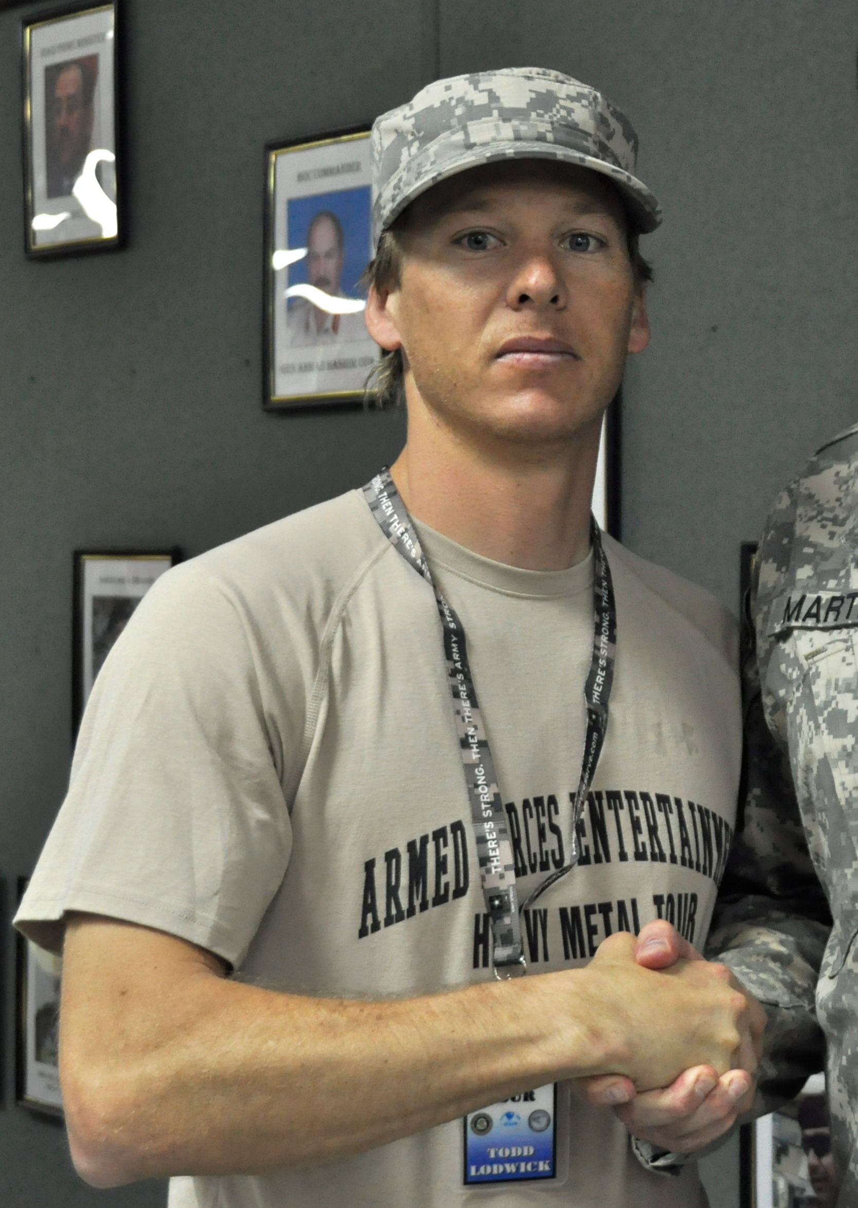 Todd Lodwick